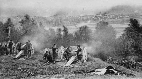 Batteria di cannoni da 75 mm francesi in zione durante la battaglia della Marna (immagine tratta da cartolina postale del 1914-1915)